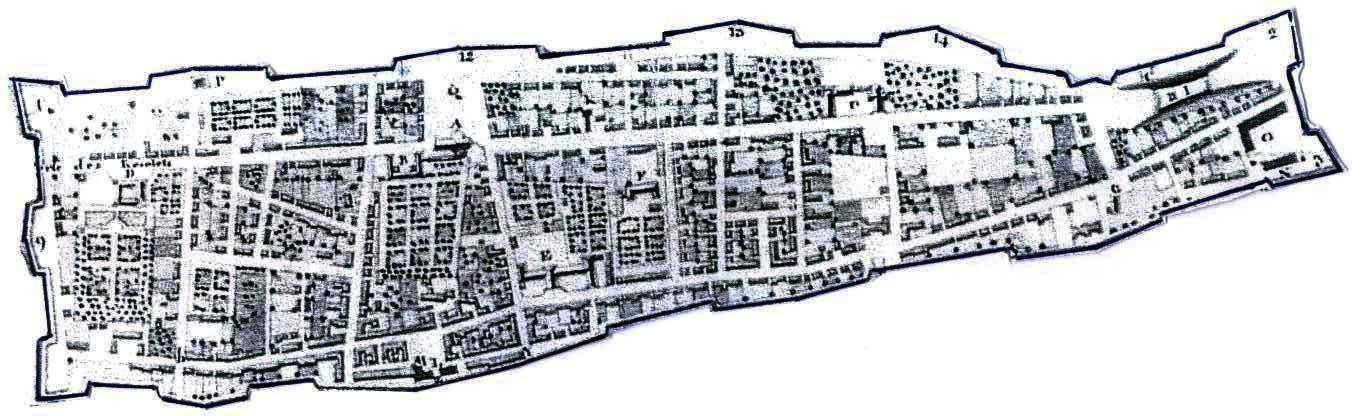 Les fortifications de Montréal. On peut compter 13 bastions et une courtine brisée vers la citadelle